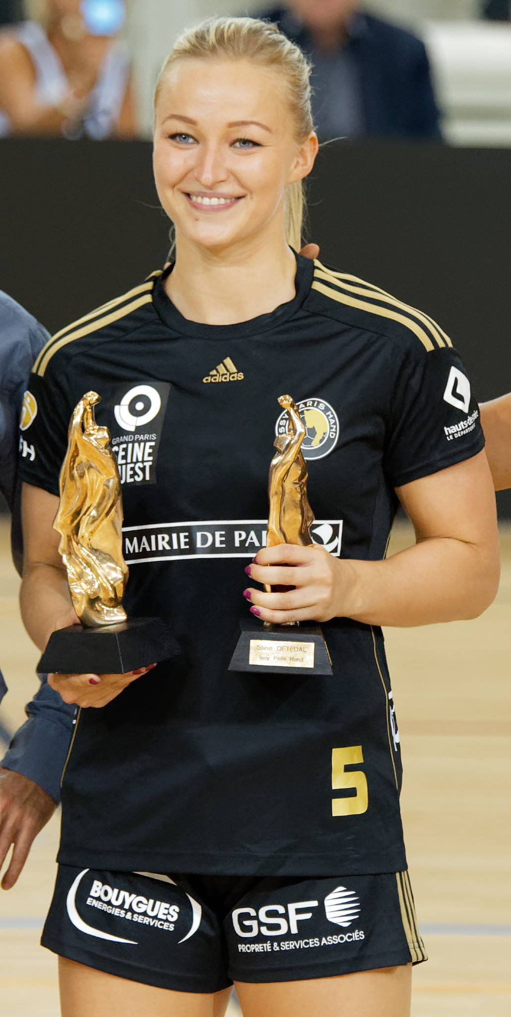 Stine Oftedal, meilleure joueuse et meilleure demie-centre 2015-16. A Issy les moulineaux, le 14 septembre 2016